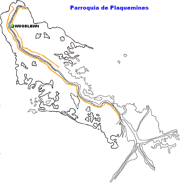 Woodlawn, Louisiana.